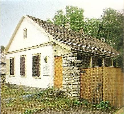 Дом немецкого колониста Готлиба Рошке, расположенный в поселке Иноземцево Ставропольского края.